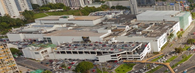 Vista aérea do shopping Iguatemi Salvador, em Salvador.